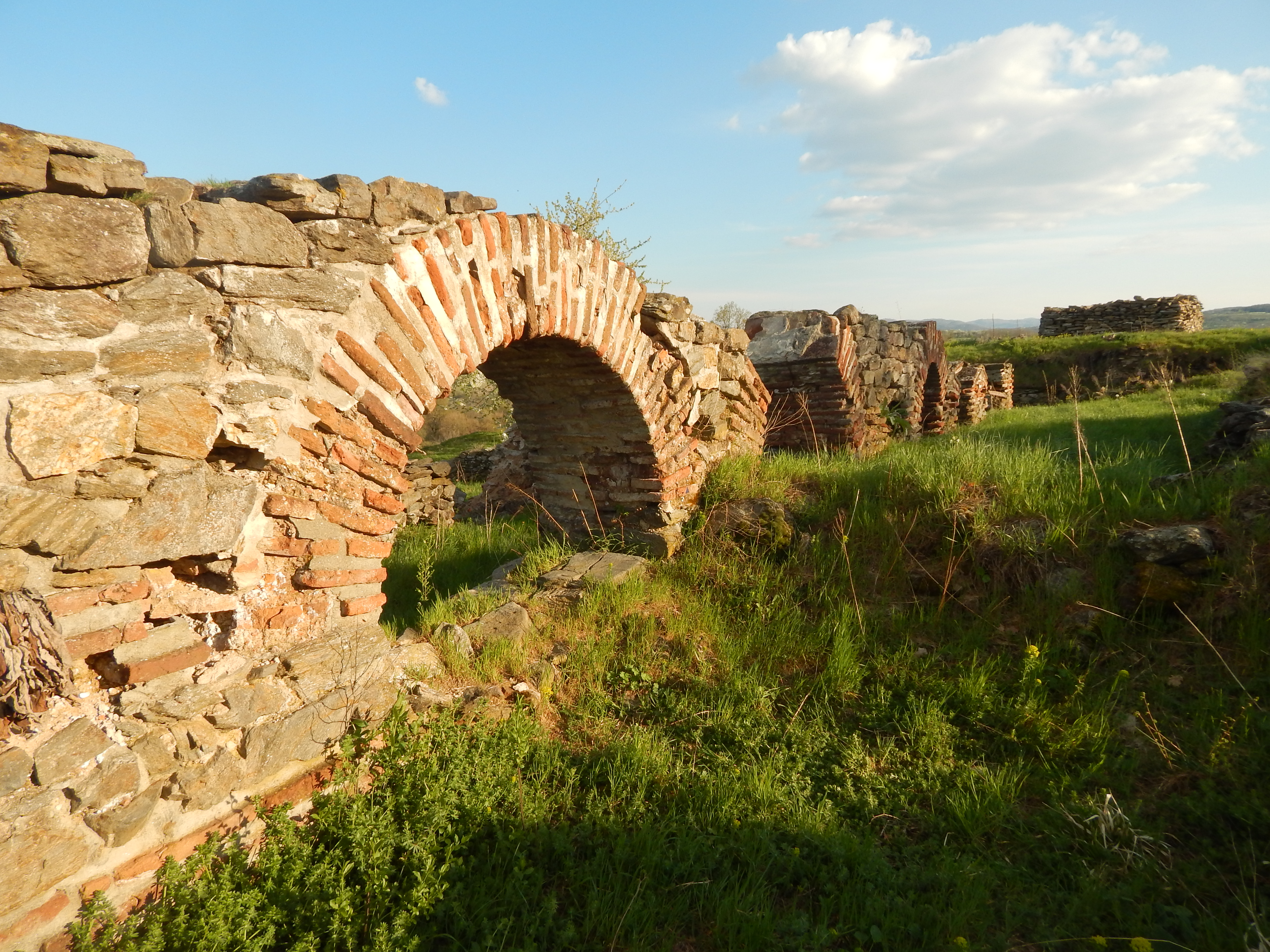 Предео изузетних одлика Радан